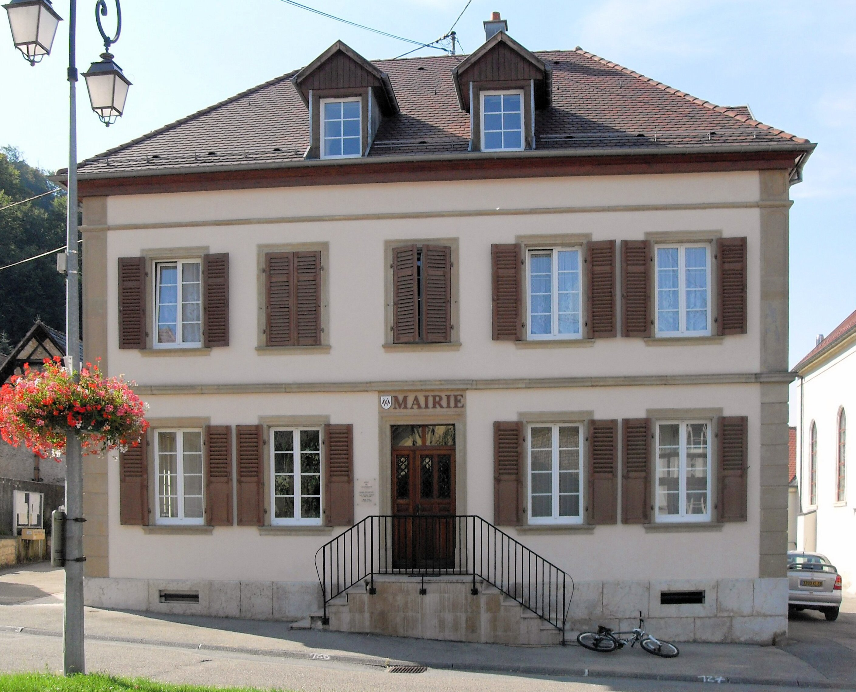 La mairie de Vieux-Ferrette